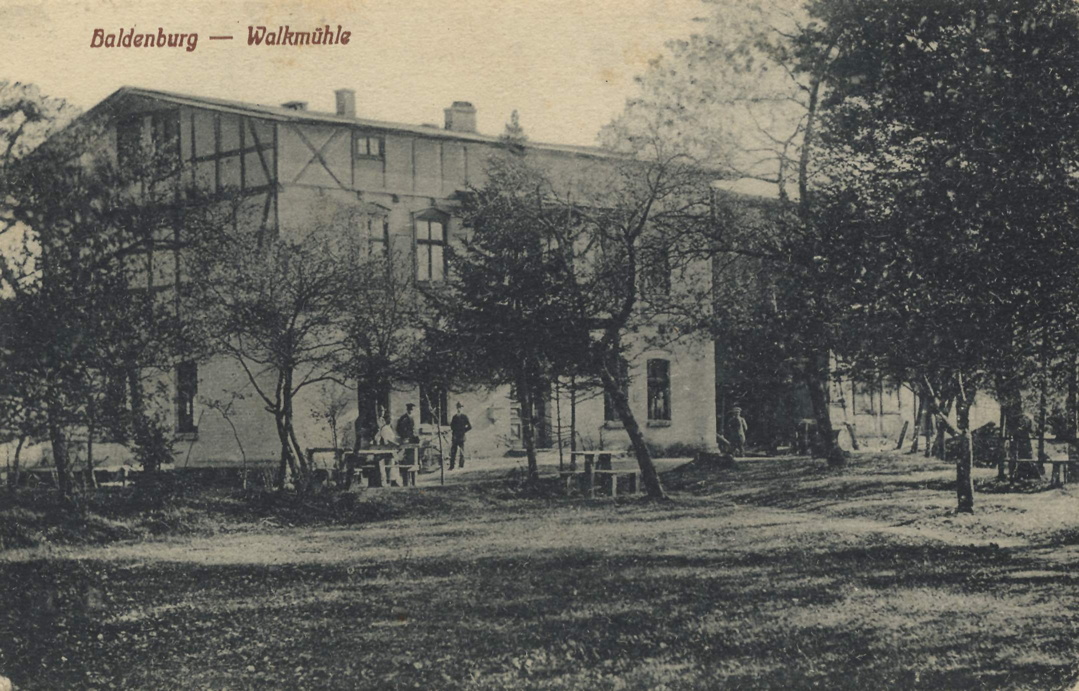 Walkmühle